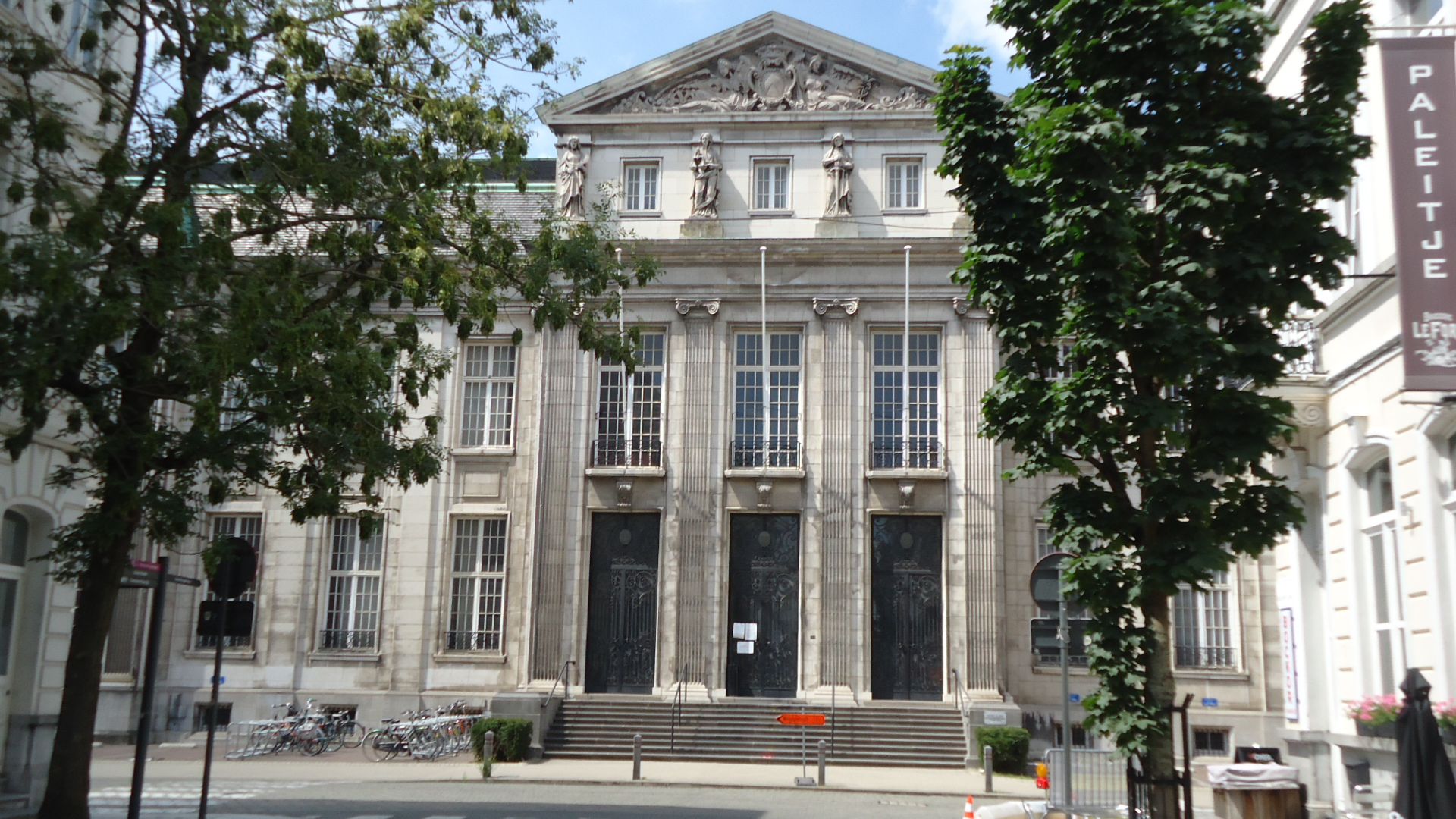 Duidelijk vooraanzicht van het gerechtshof